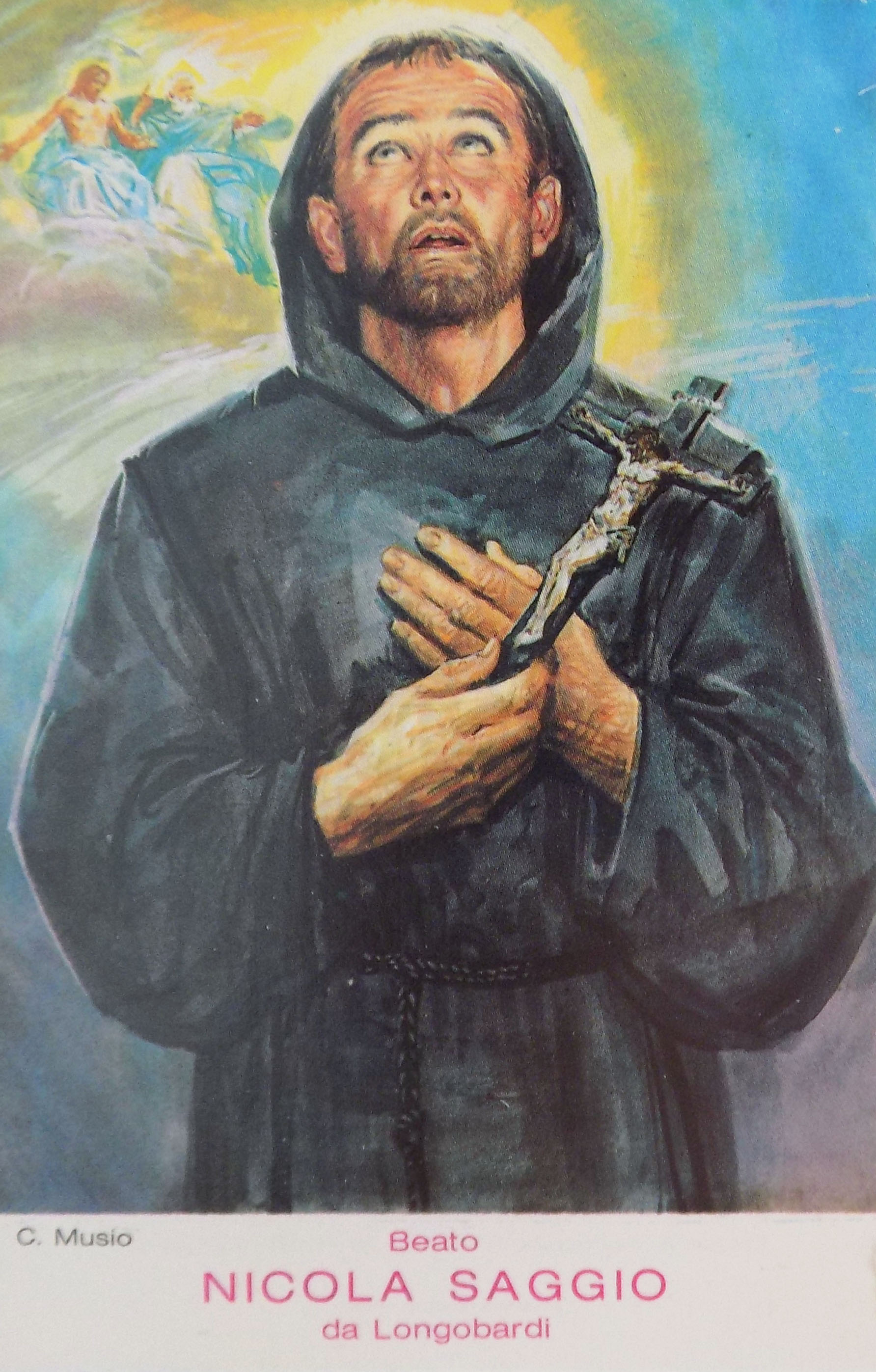 una Riproduzione dell'Immagine di San Nicola Saggio esposta a Campora San Giovanni in occasione della sua canonizzazione e festa patronale di San Francesco di Paola.